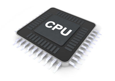 Central Processing Unit